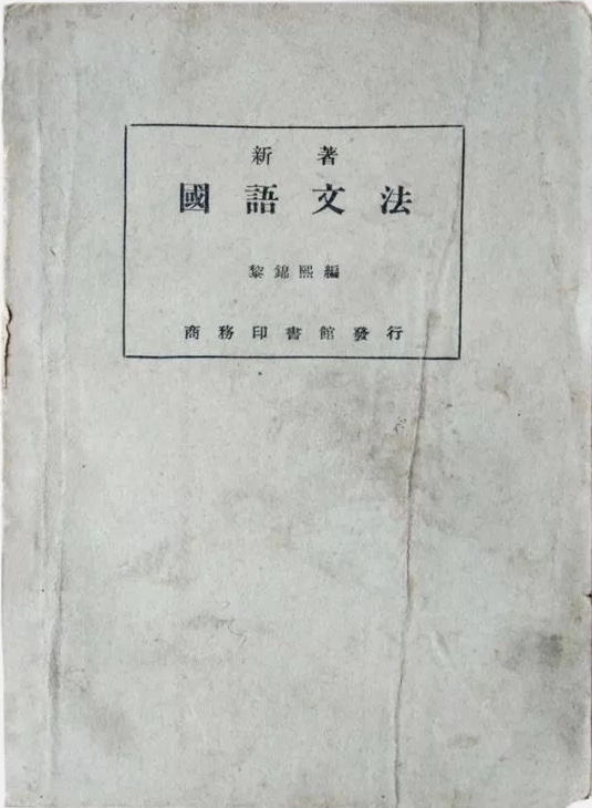 黎錦熙作《國語文法》封面